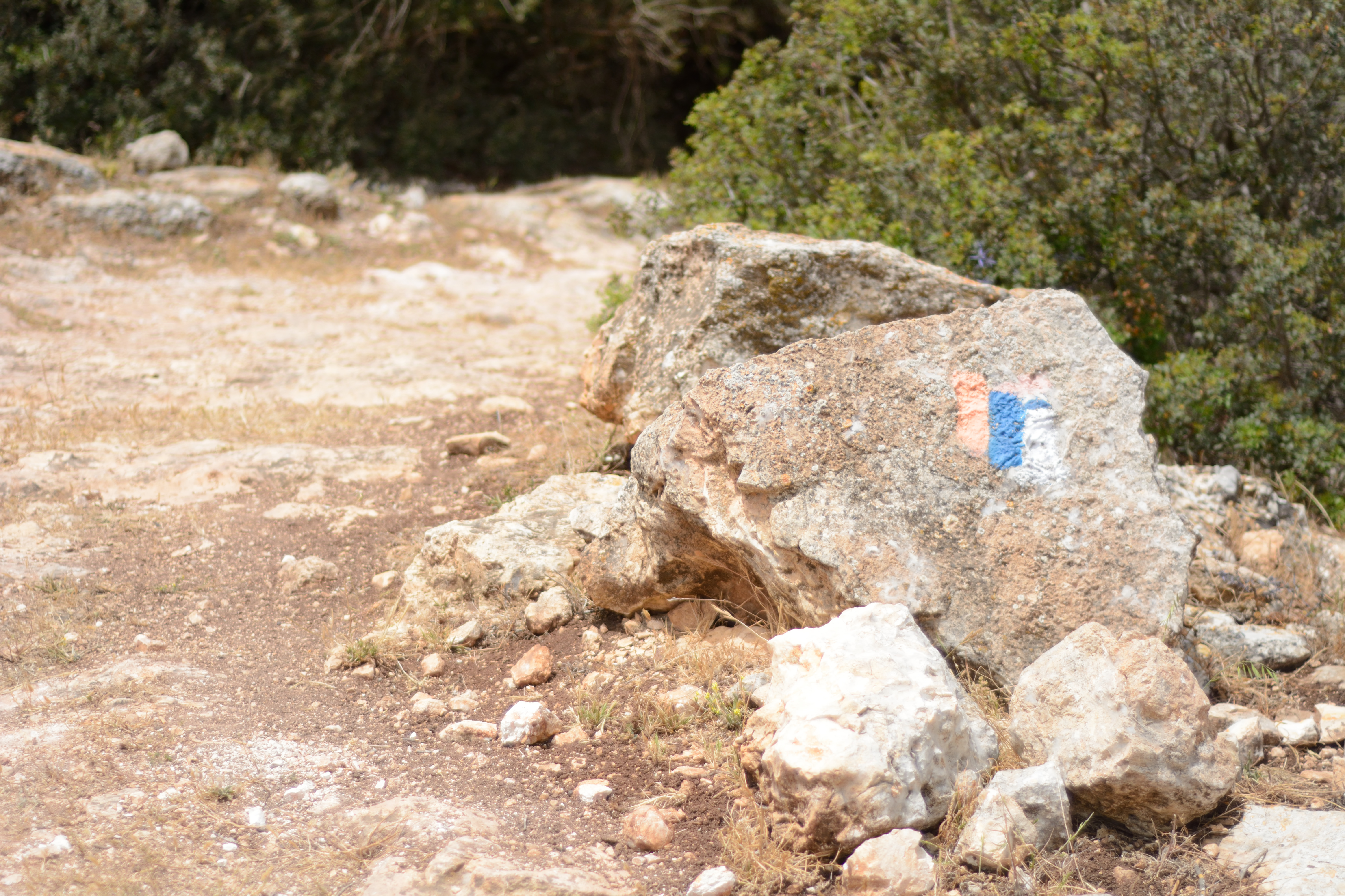 На Национальном Израильском тракте в Нижней Галилее (Заповедник Алоним).